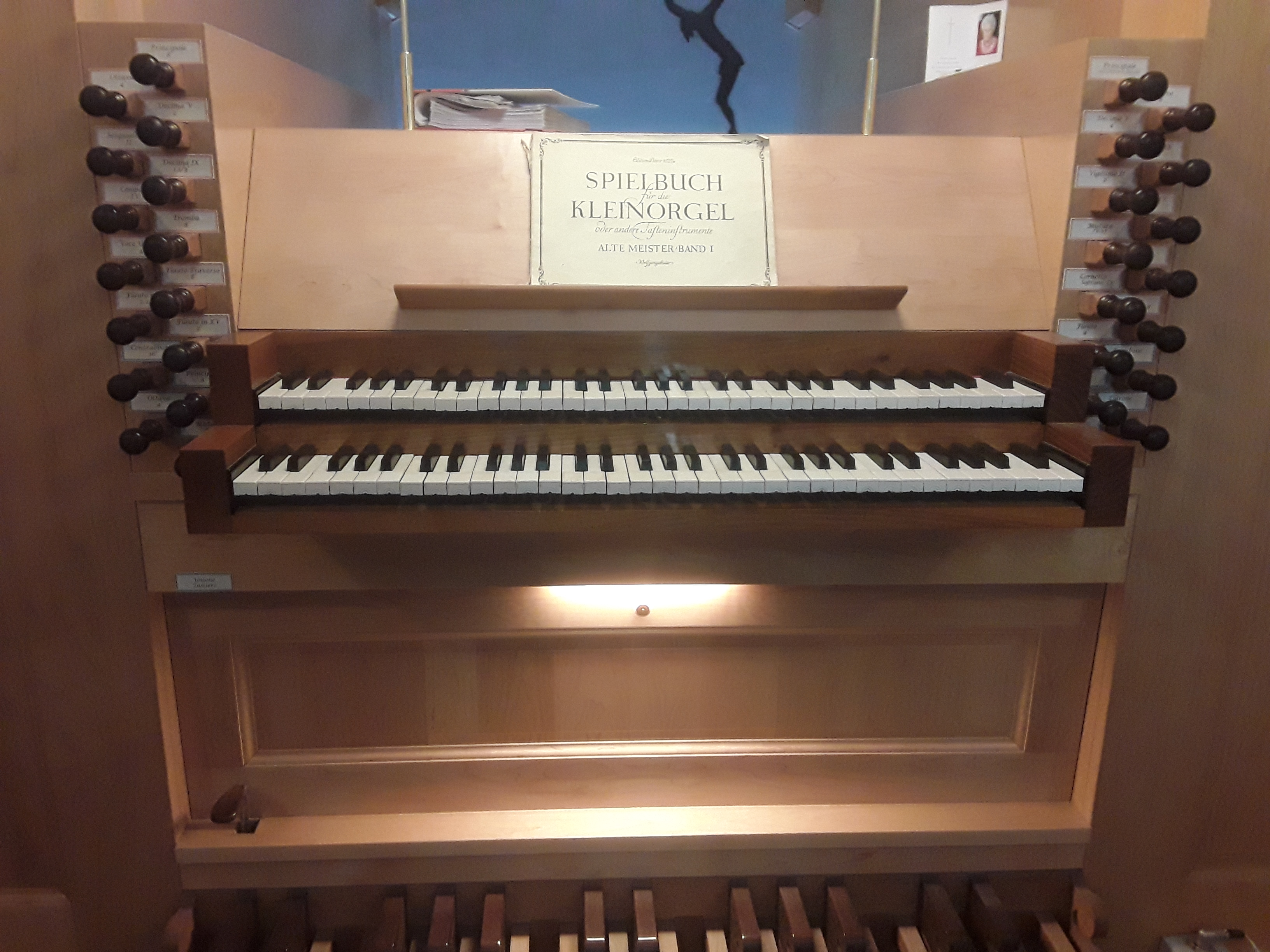 Consolle a 2 manuali e pedaliera piana dell'organo Lorenzini dell chiesa di S.Paolo a Bolzano